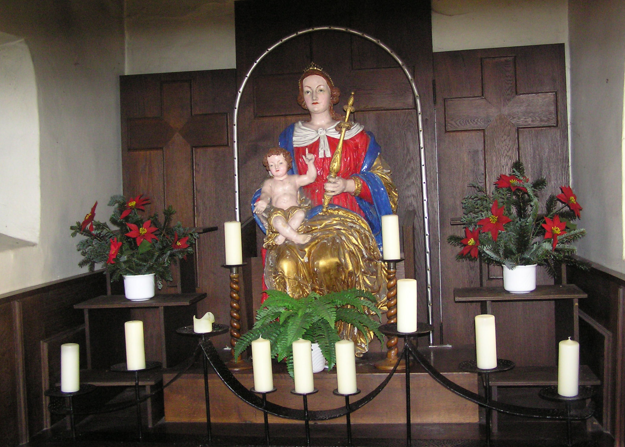 Heeker Klause, Alfhausen, Ortsteil Heeke